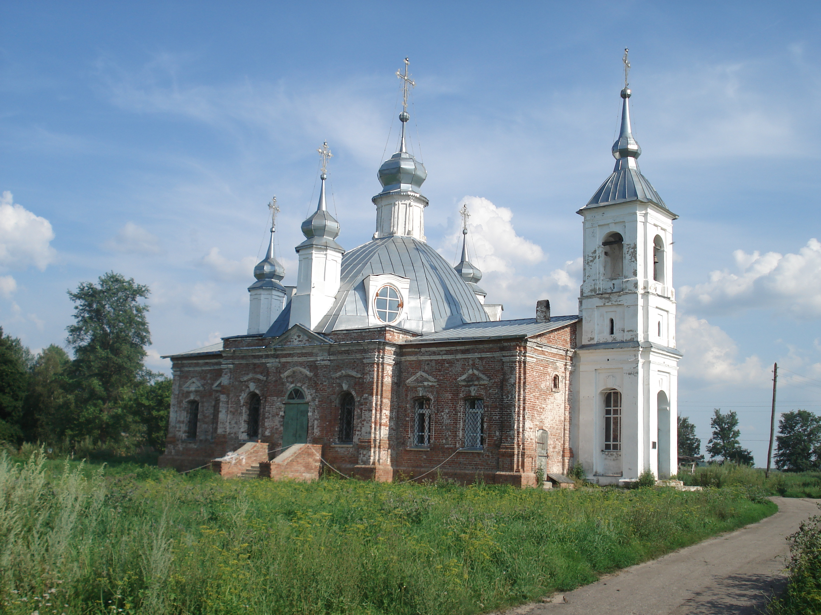 Троицкая церковь (с.Красное)